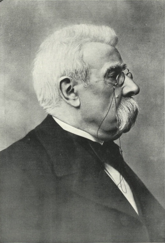 Fotografía de Manuel Durán y Bas, por Pablo Audouard